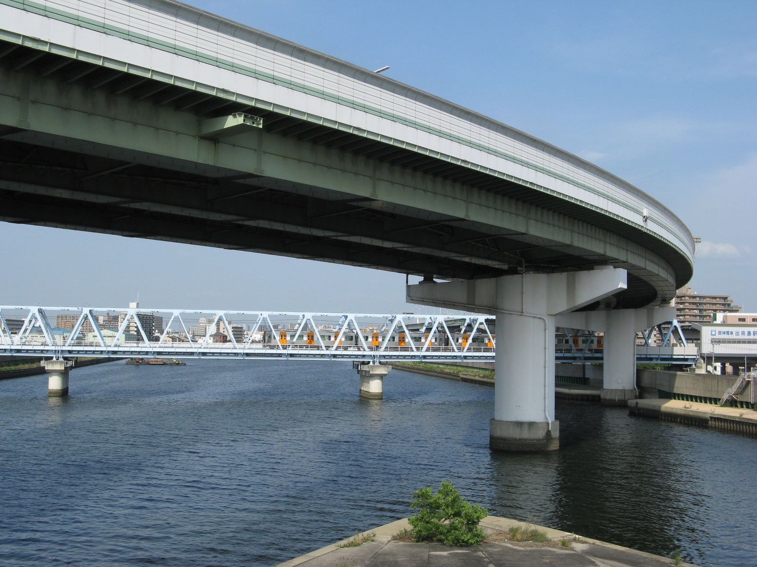 神崎川 出来島大橋・中島大橋から上流方を望む 手前で神崎川（右）と中島川が分かれている 鉄橋は阪神なんば線（撮影当時は西大阪線）、上の高架は阪神高速道路3号神戸線